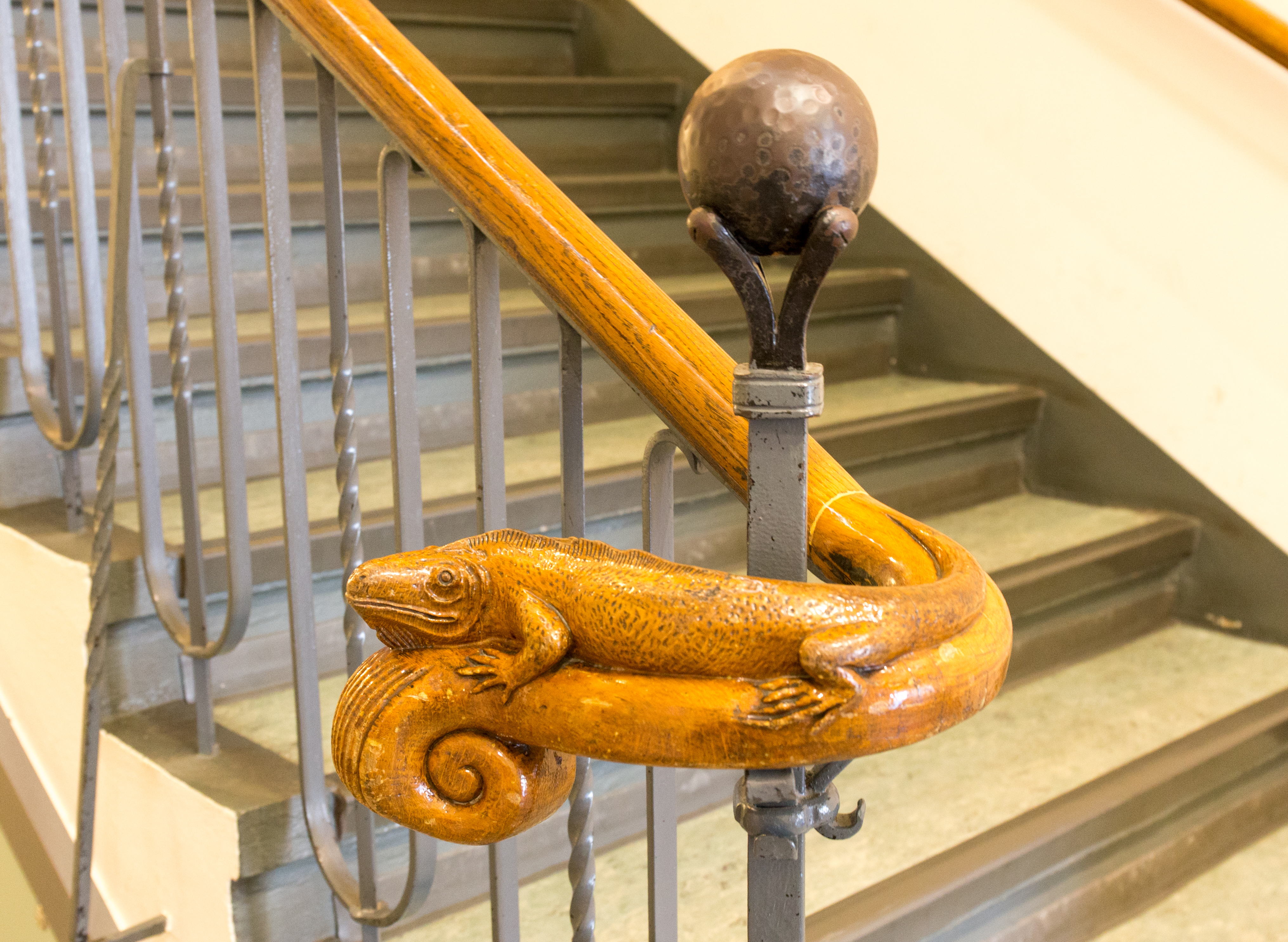 Handlauf im Museum Senkenberg in Görlitz